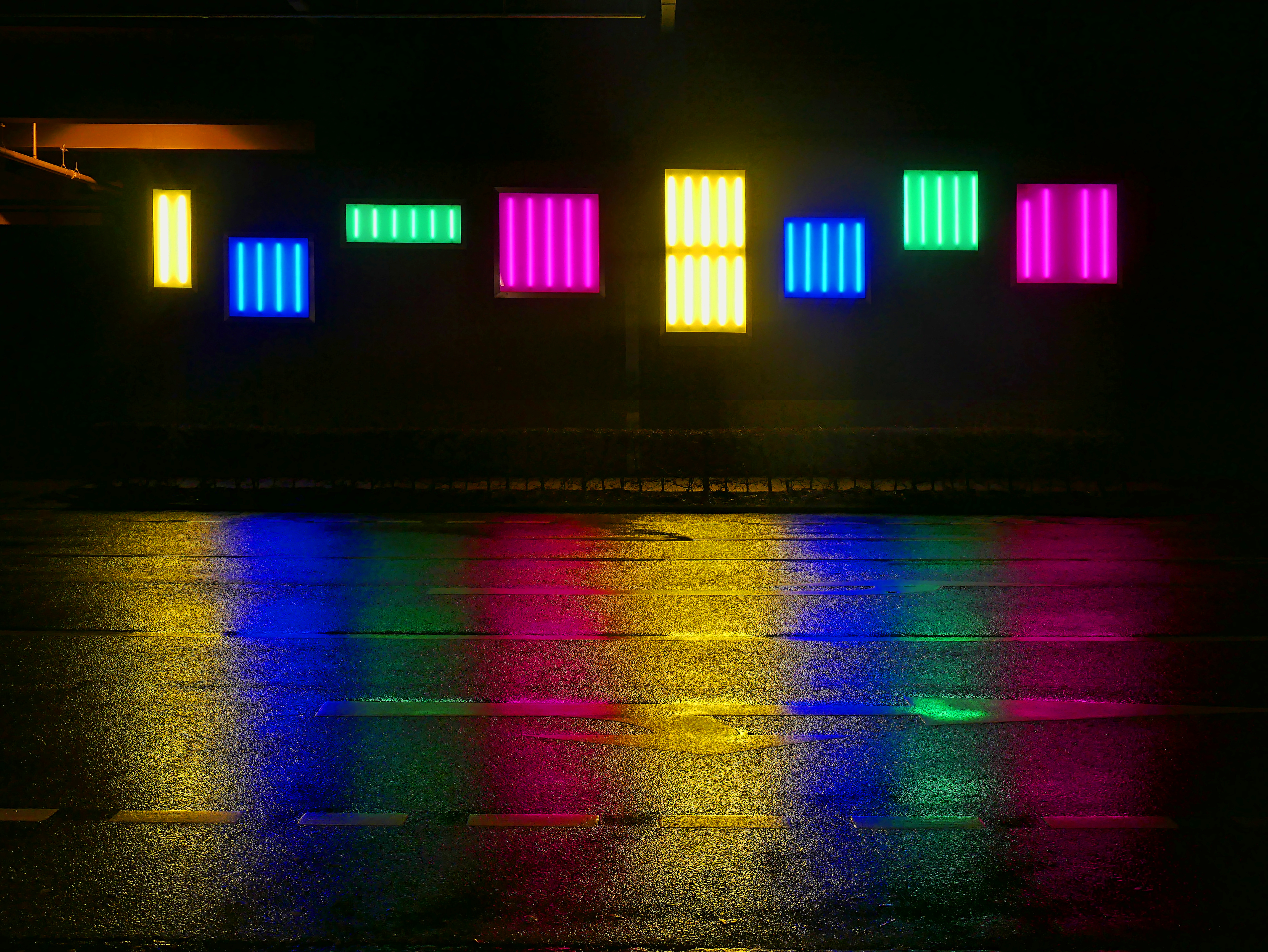 Lichtkunst in Konz (Deutschland, Rheinland Pfalz) an der Wand des Kaufland-Lagers in der Lessingstraße